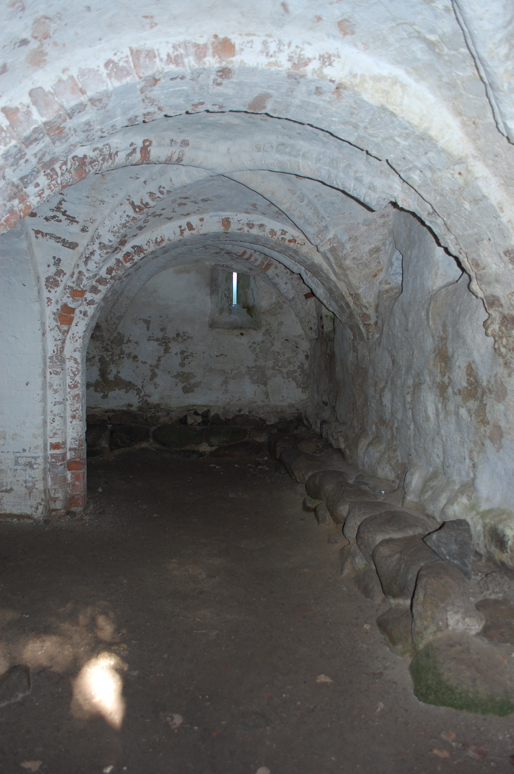 sogenannter Bischofskeller auf Ivö